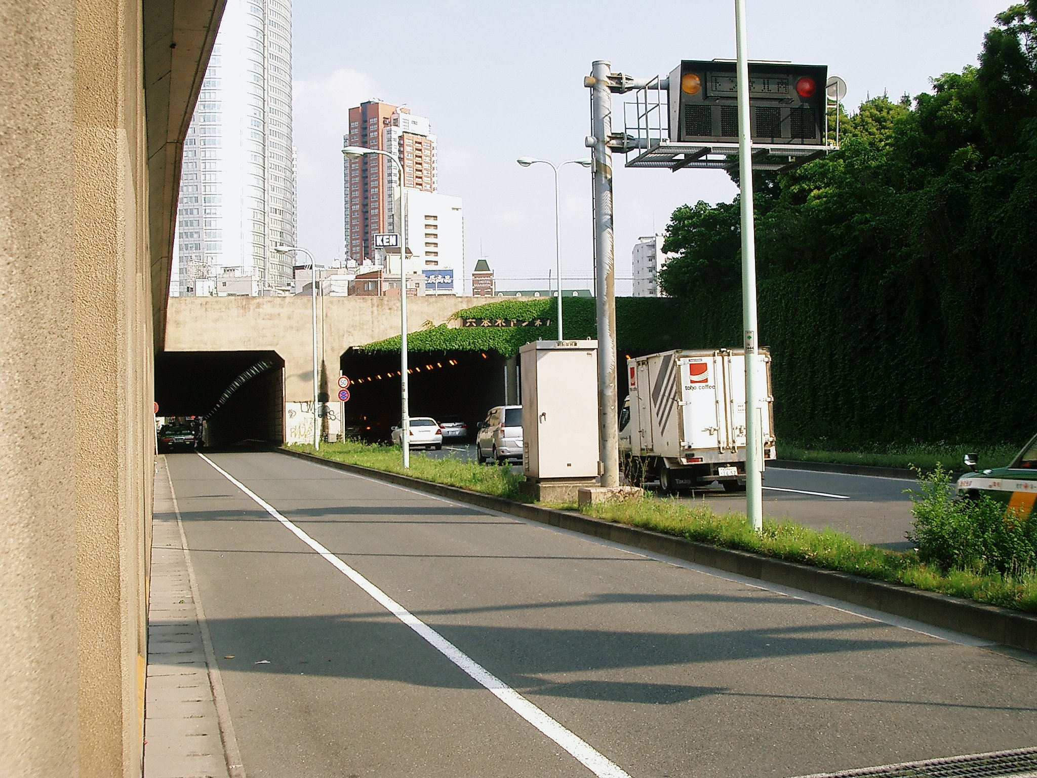 Roppongi Tunnel 六本木トンネル